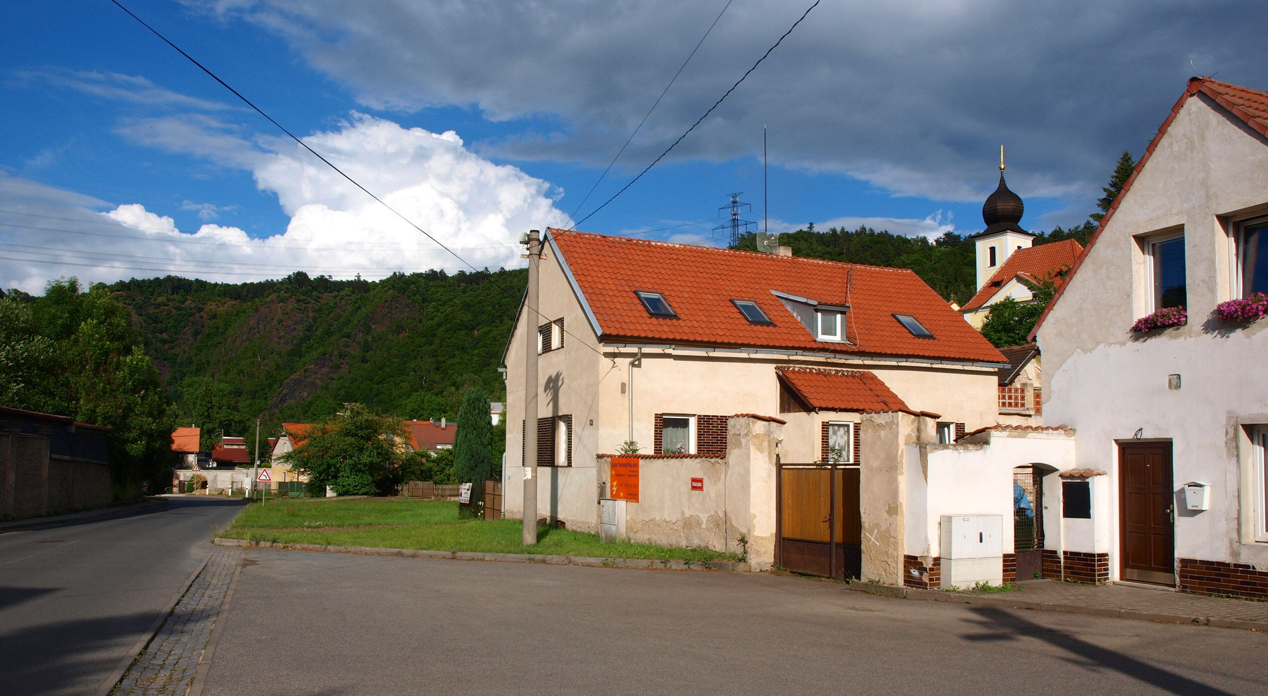 Vrané nad Vltavou